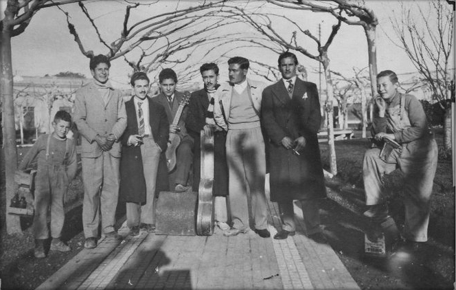 Vecinos de Merlo, c. 1955.